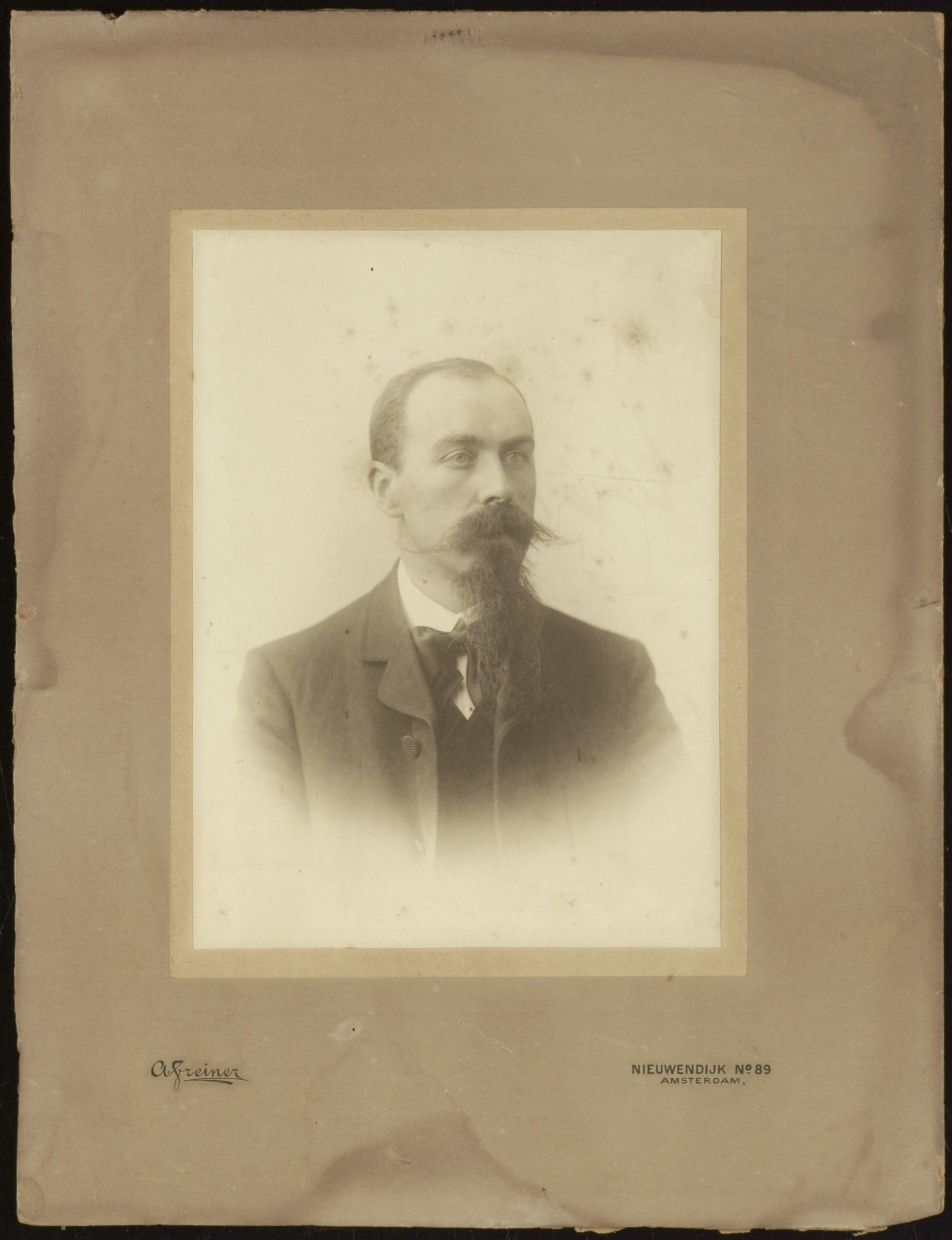 Beschrijving Portretfoto van Zeger Daniël Johan Wilhelm Gulden Documenttype foto Vervaardiger Greiner, Albert (1833-1890) Collectie Archief van de Familie Gulden-Dutry Datering 1908 ca. Inventarissen Afbeeldingsbestand ANWN00383000001